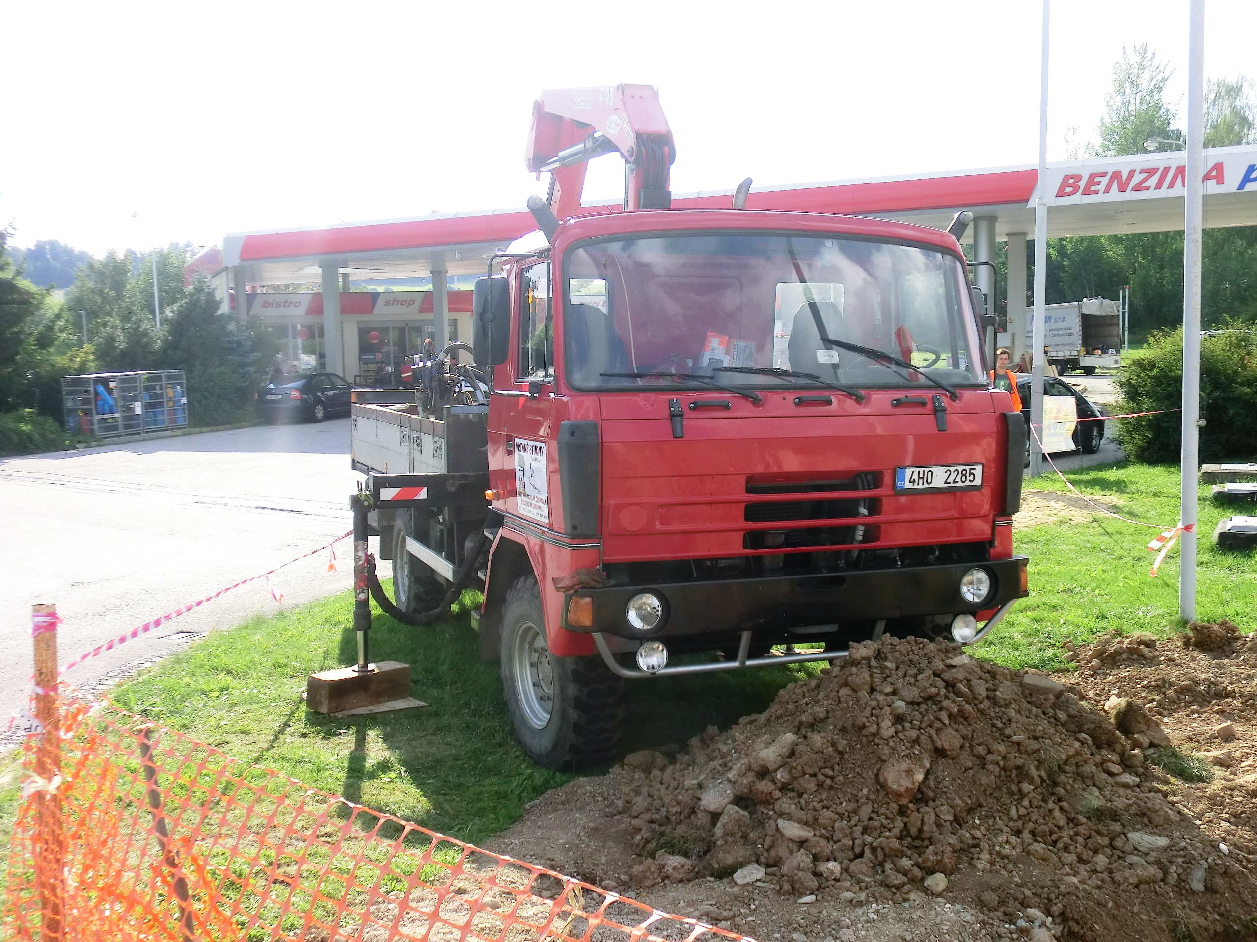 ROSS VIZA 4×4 ve službách studnařské firmy František Klazar, Lánov.